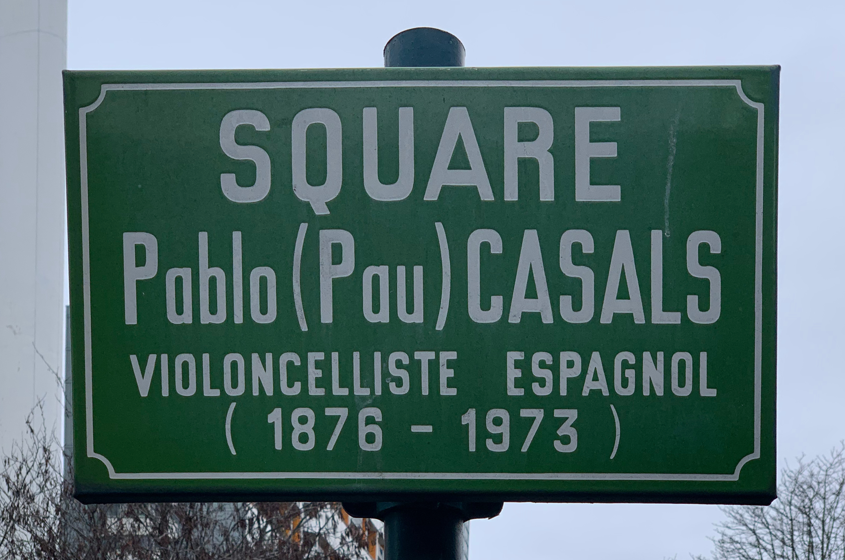 Square Pau Casals (Paris), février 2020.